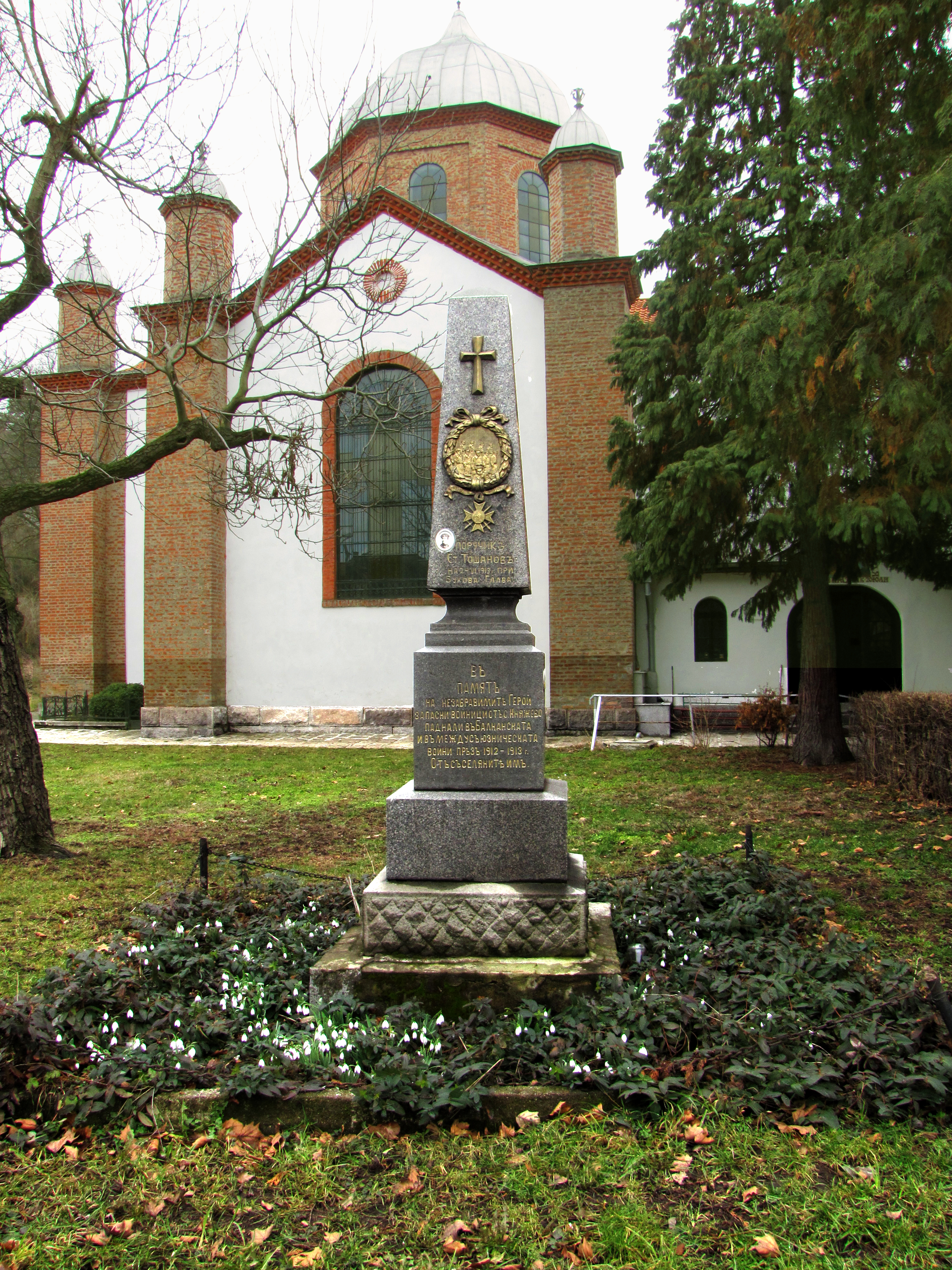 Паметникът на загиналите войници